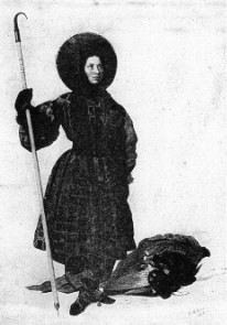 Henriette d’Angeville (1794–1871)